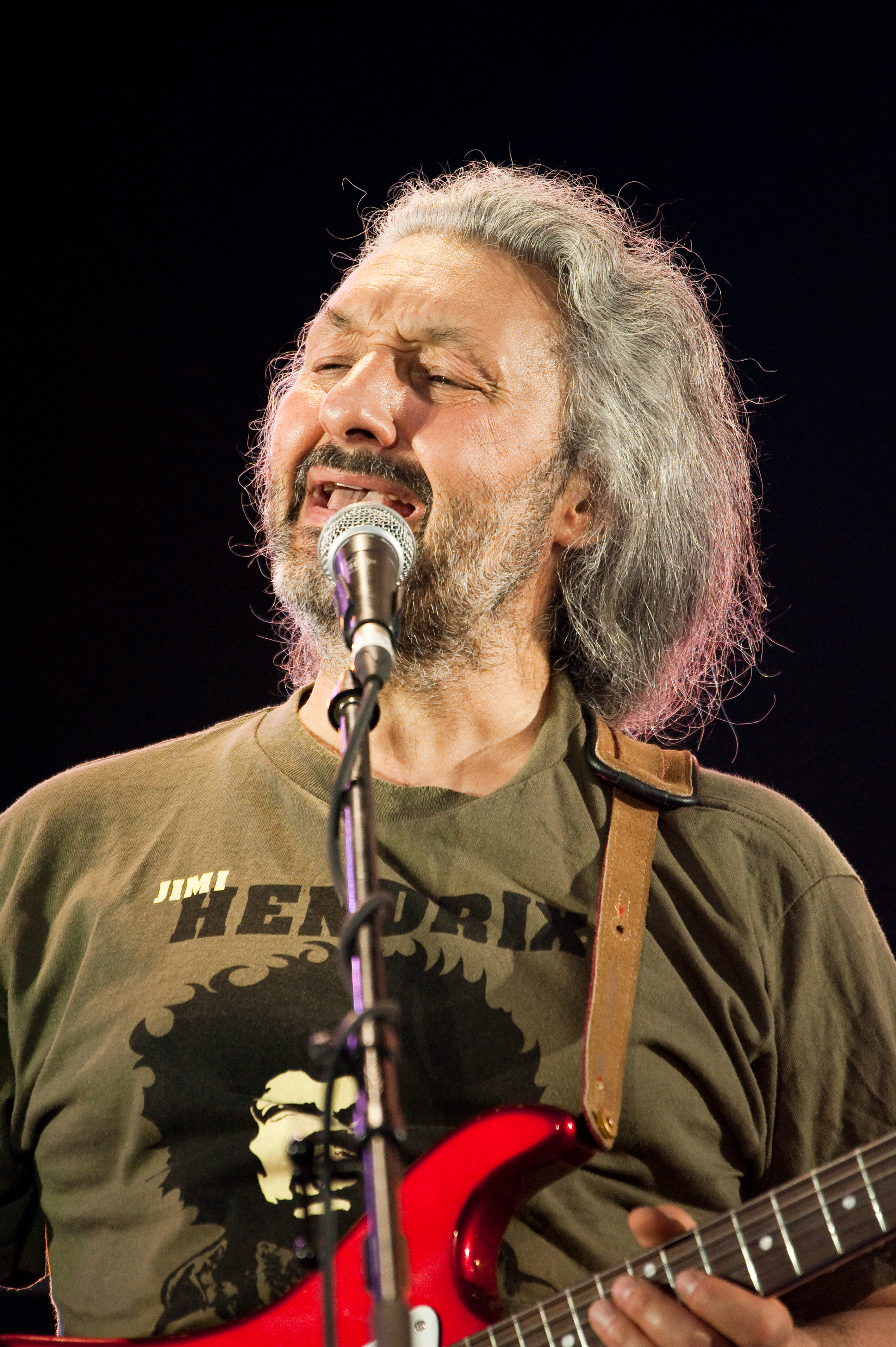 Анастас Алексеевич Микоян (Стас Намин). Фото на концерте